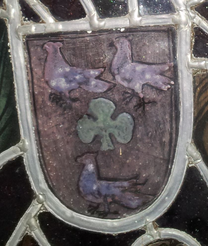 Familiewapen van het patricisch geslacht Van Vloten uitgevoerd in glas in lood